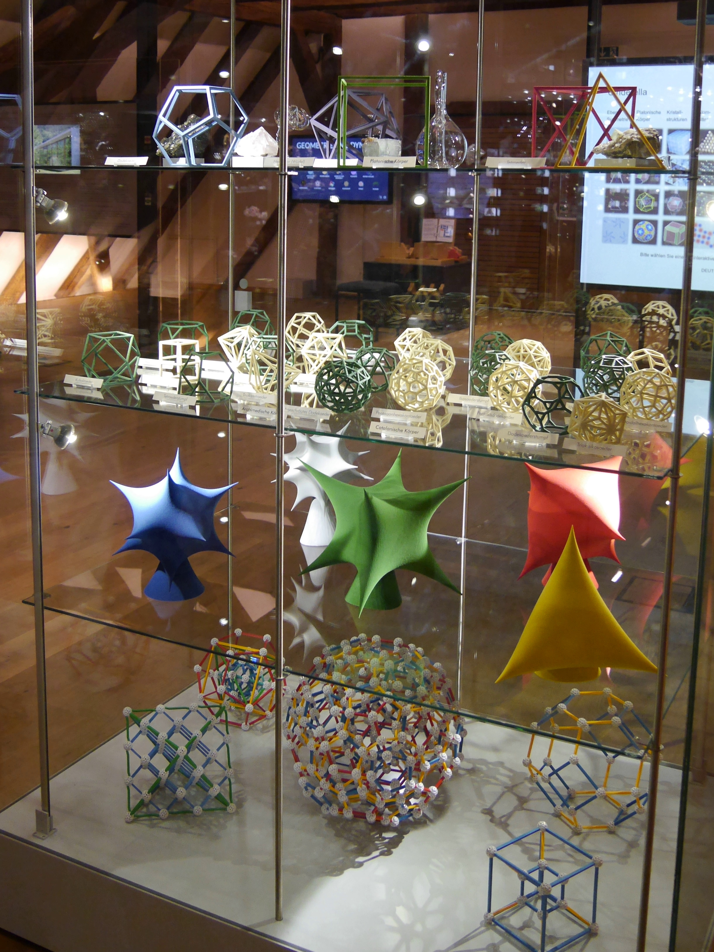 Exponate im Mineralien- und Mathematikmuseum, Besuch anlässlich der AdminConvention 2018 der deutschen Wikipedia.